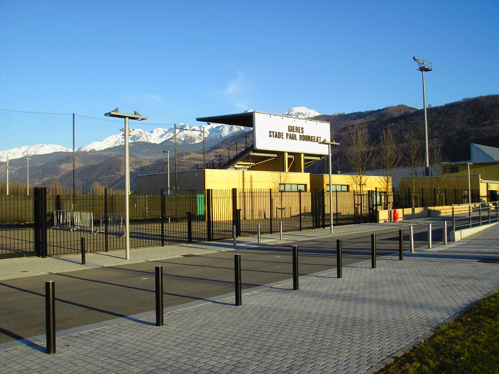 Stade Paul Bourgeat à Gières.